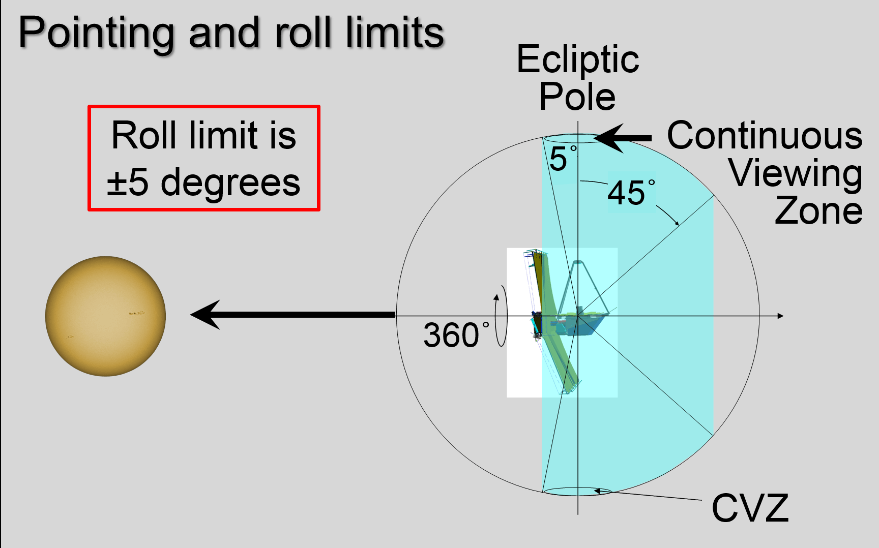 JWST space telescope pointing and roll limits